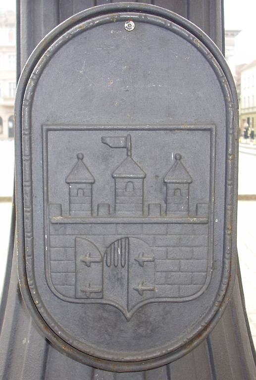 Ozdobna pokrywa latarni z herbem Bydgoszczy.